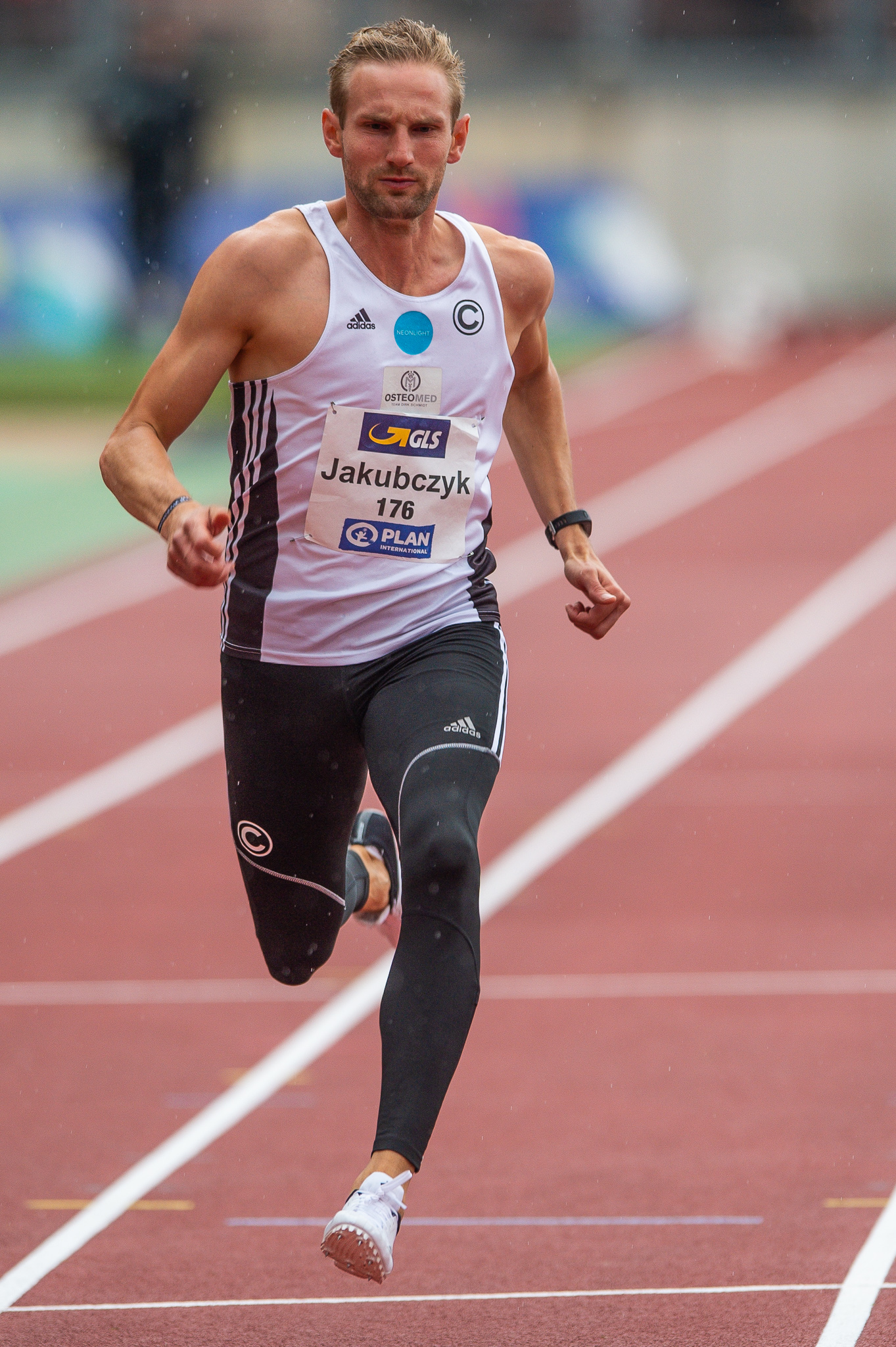 100-Meter-Lauf,DLV,Deutsche Leichtathletik Meisterschaften 2018,Deutscher Leichtathletik-Verband,Lucas Jakubczyk,Max-Morlock-Stadion,SCC Berlin